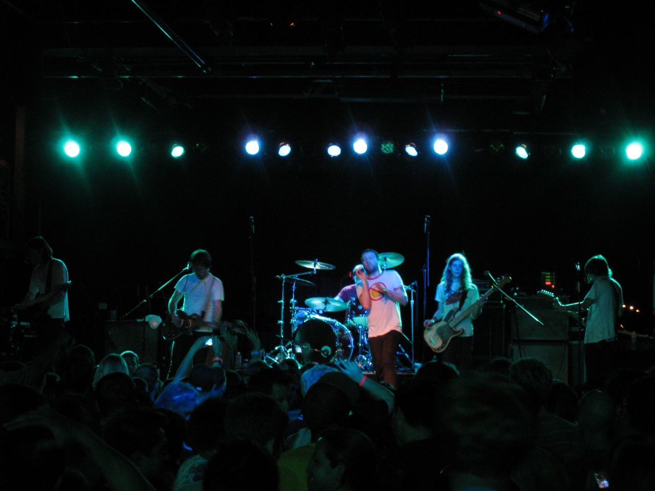 Say Anything at Pipeline Cafe